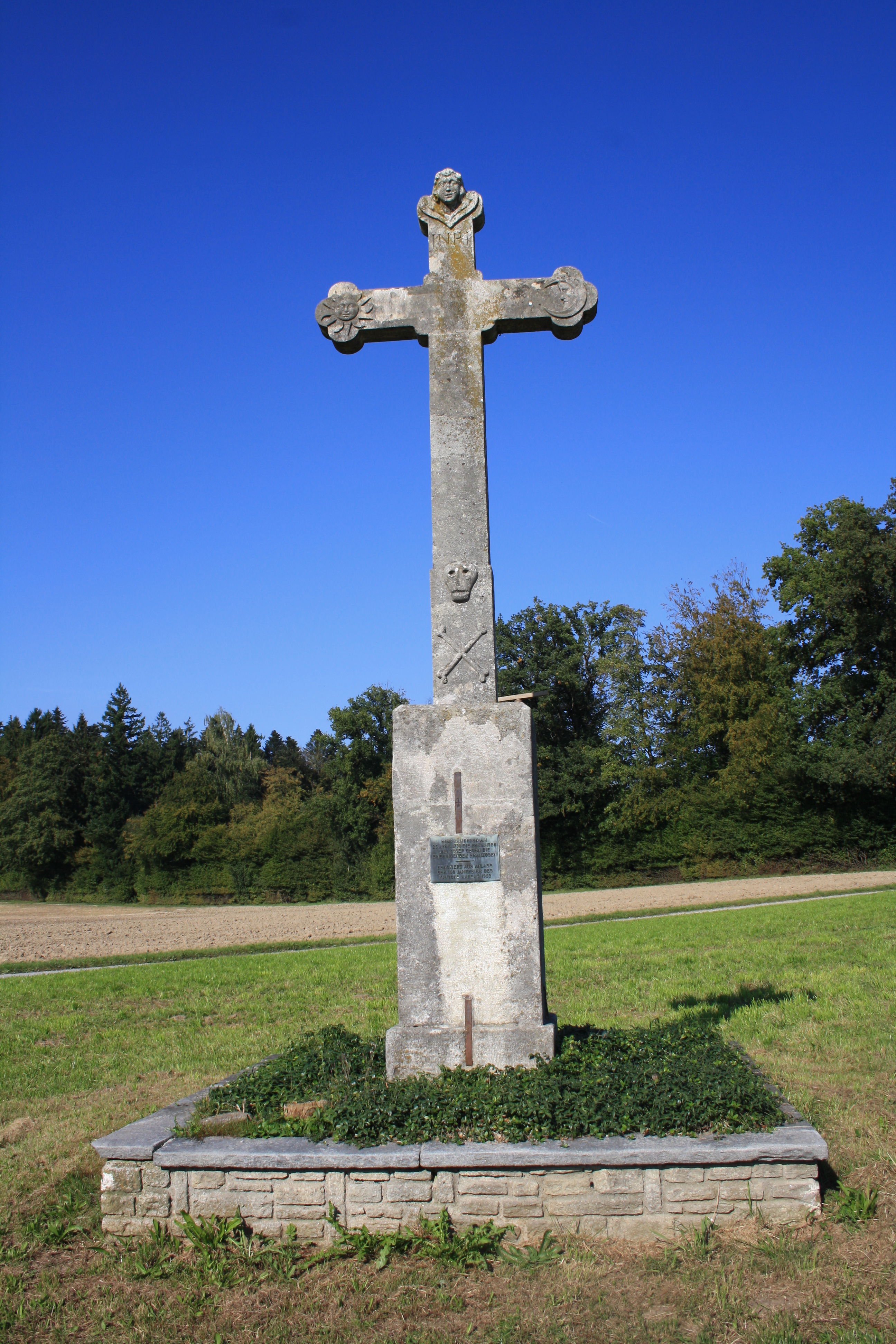 Hägglingen